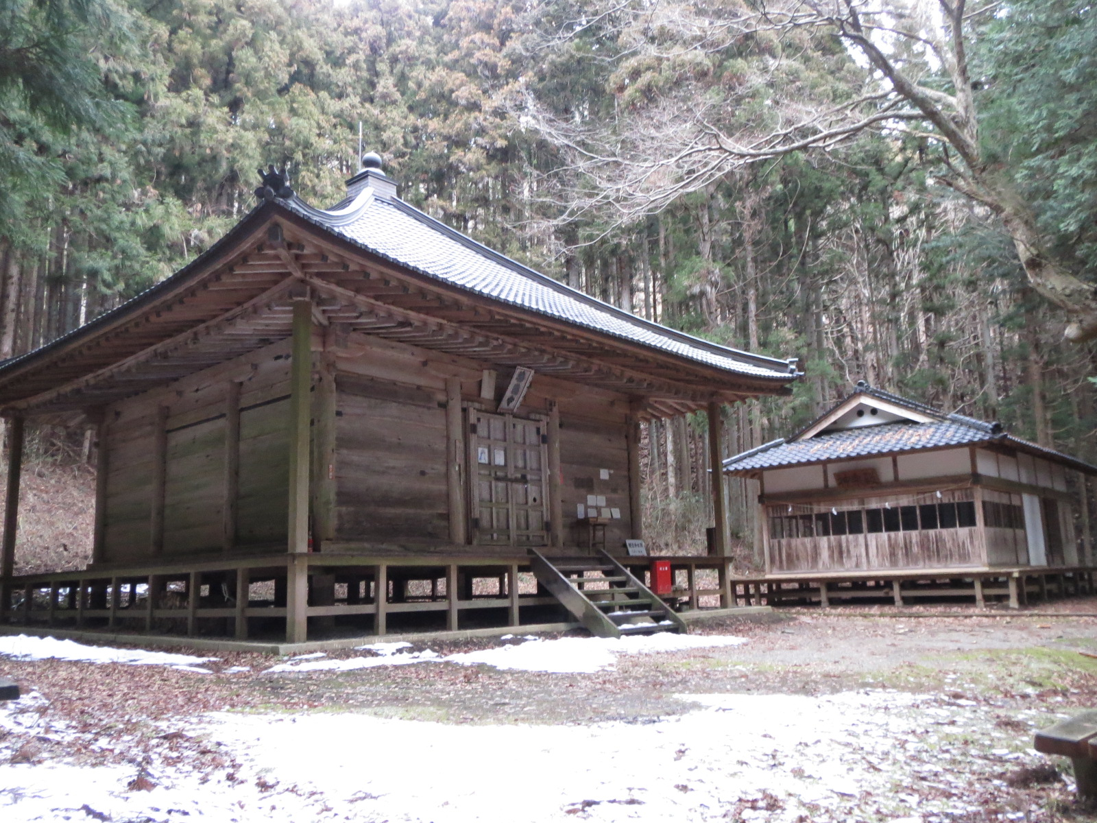 遠野市にある鞍迫観音堂 Canon IXY 3